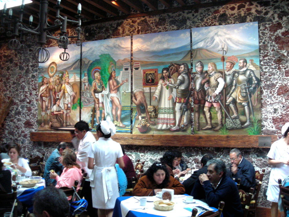 Restaurante Café de Tacuba, Centro Histórico, México